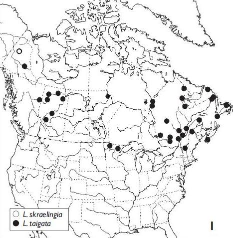 Range map